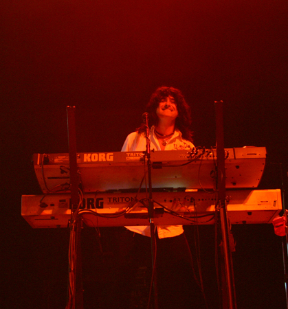 Whitesnake in São Paulo - 09/05/2008